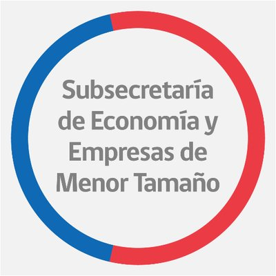 Logo de la Subsecretaría de Economía y Empresas de Menor Tamaño